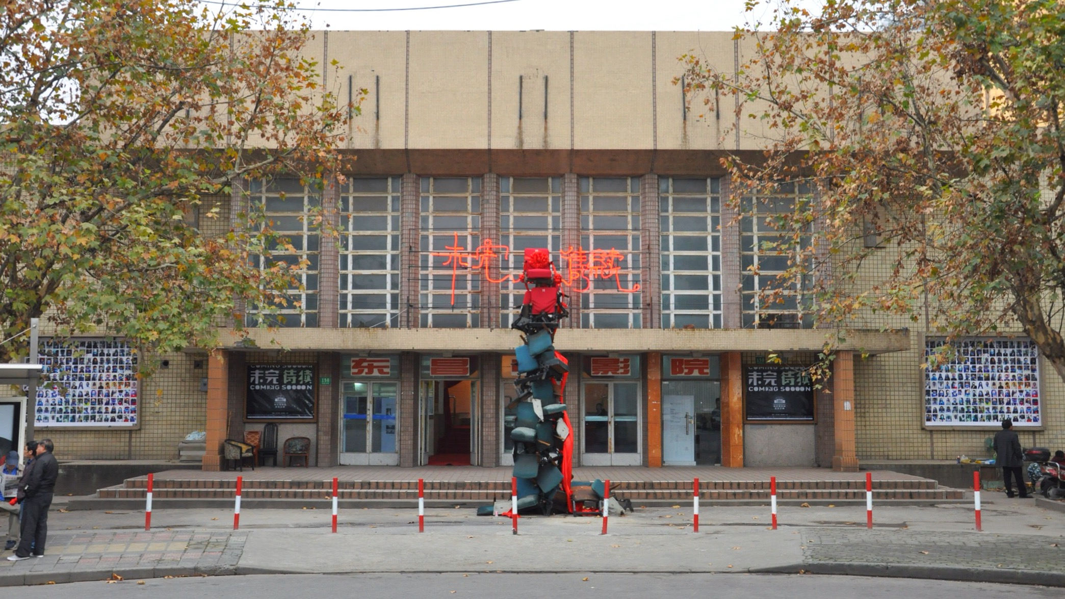 东昌电影院 南泉北路150号（原崂山西路150号）